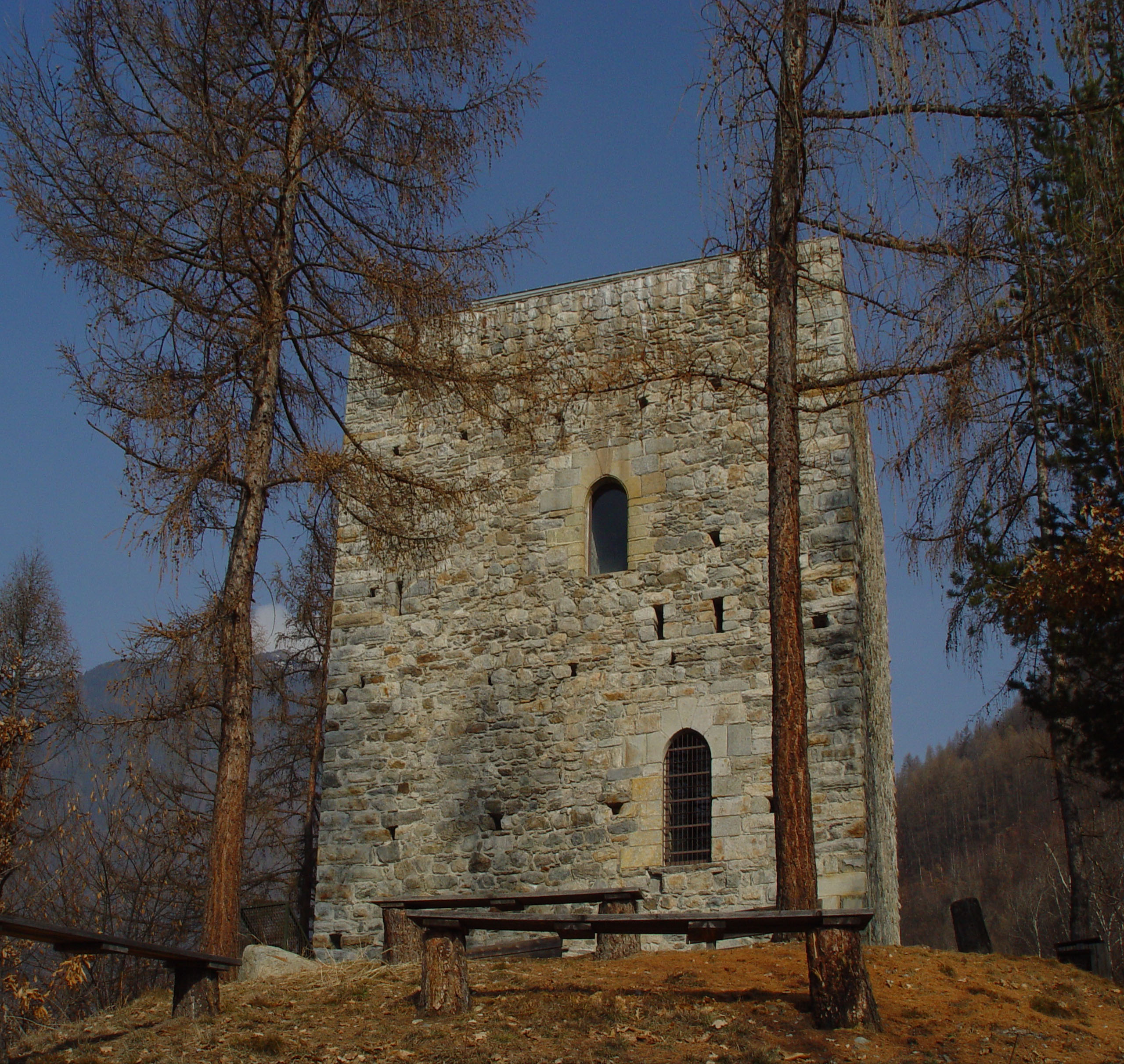 Description Torre di Castionetto Date n/a Location Castionetto, Chiuro, Sondrio - Italy Photographer Franco Folini